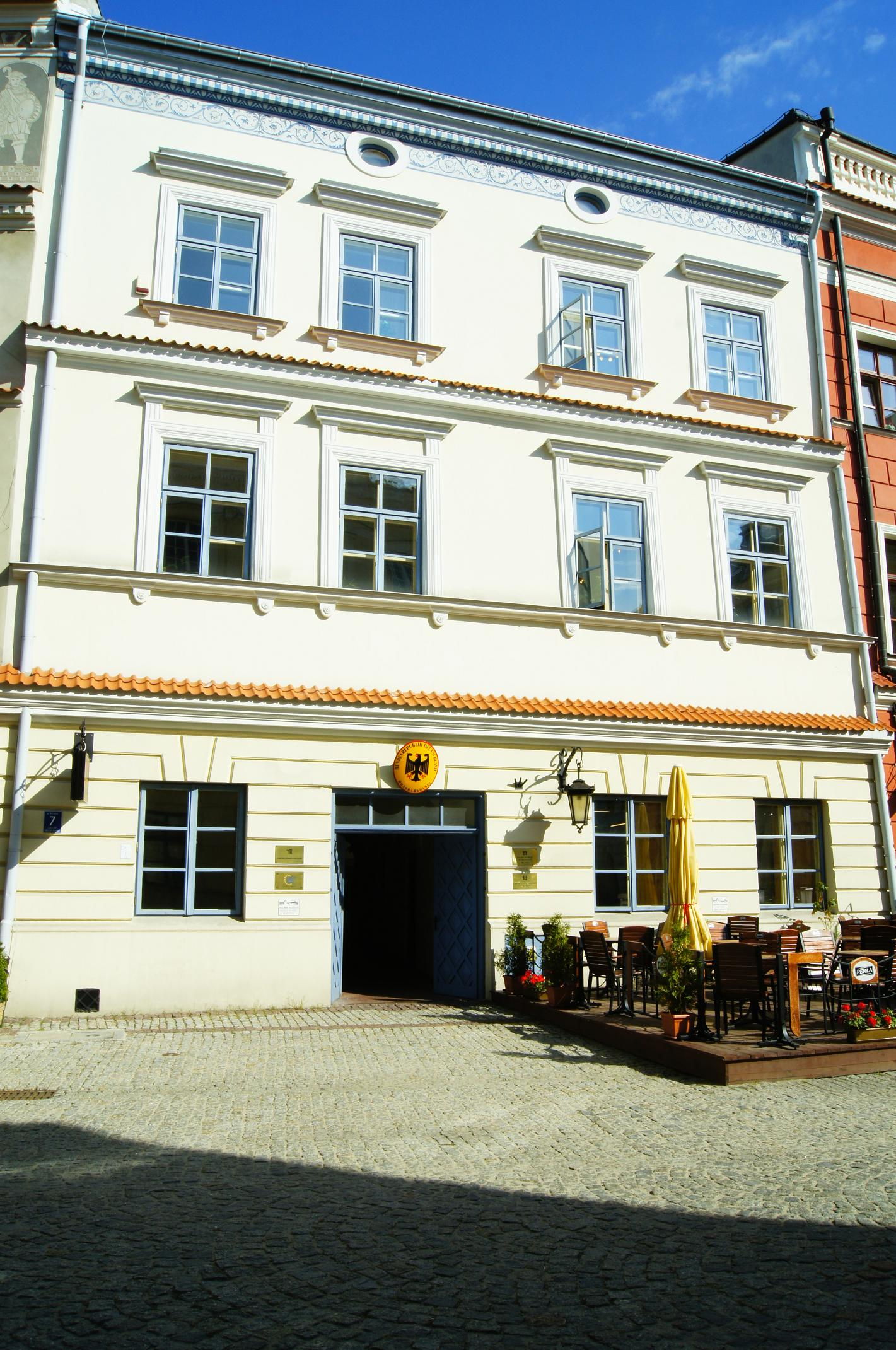 Lublin, Rynek 7 - kamienica (zabytek nr A/492 z 17.03.1971)